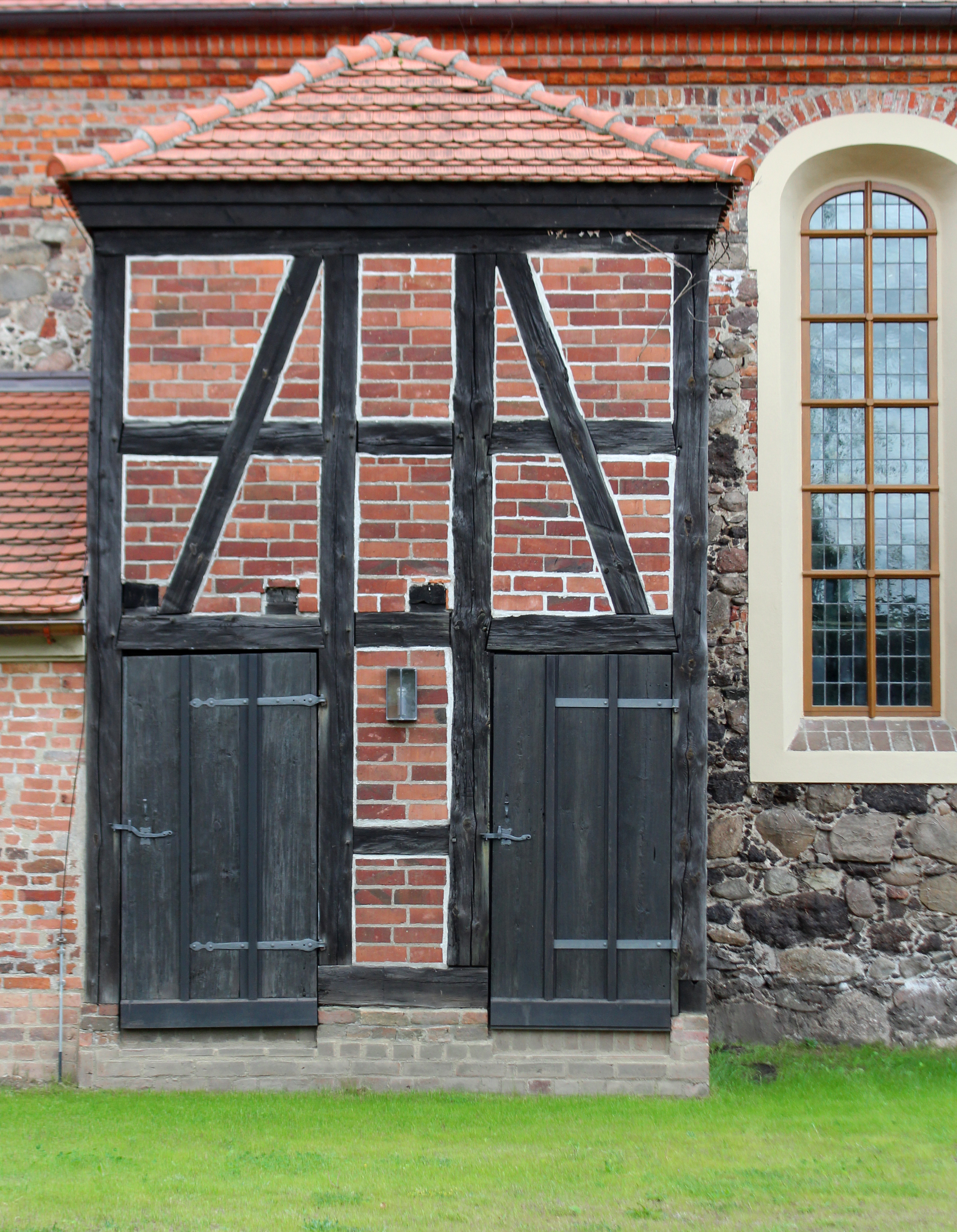 St. Johanniskirche, Cottbus-Kahren